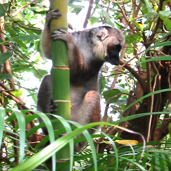 Männlicher Weisskopfmaki (Eulemur fulvus albifrons) in der Masoala-Halle im Zoo Zürich.